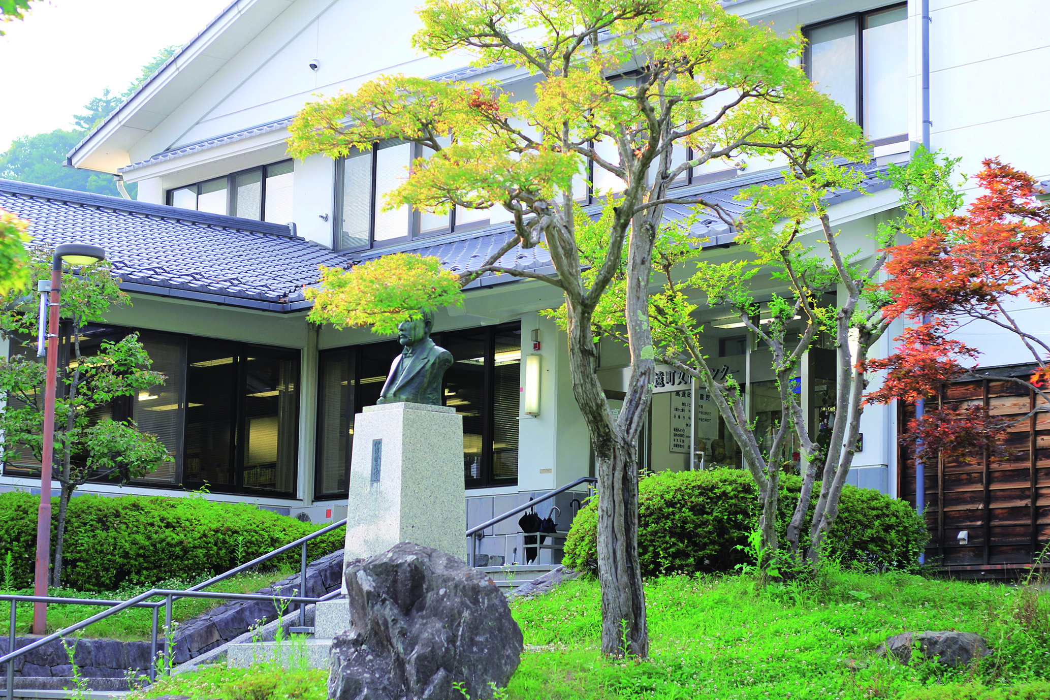 長野県伊那市高遠町にある伊那市立高遠町図書館